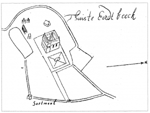 Eerbeekse Oliemolen oudste vermelding op kaart